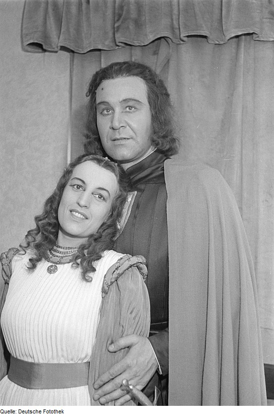 Original image description from the Deutsche FotothekSzenenbilder